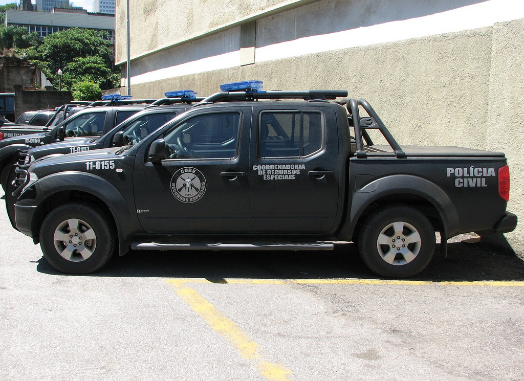 CORE - Coordenadoria de Recursos Especiais - a SWAT of Rio de Janeiro Civil Police.